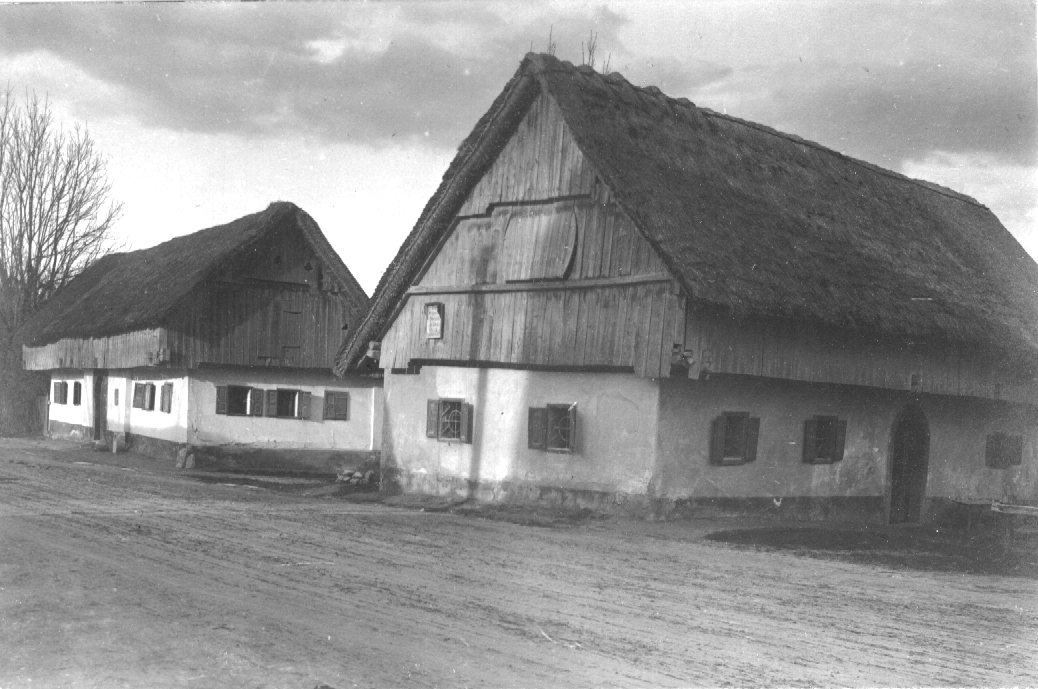 Hiši v Mali vasi, Ježica